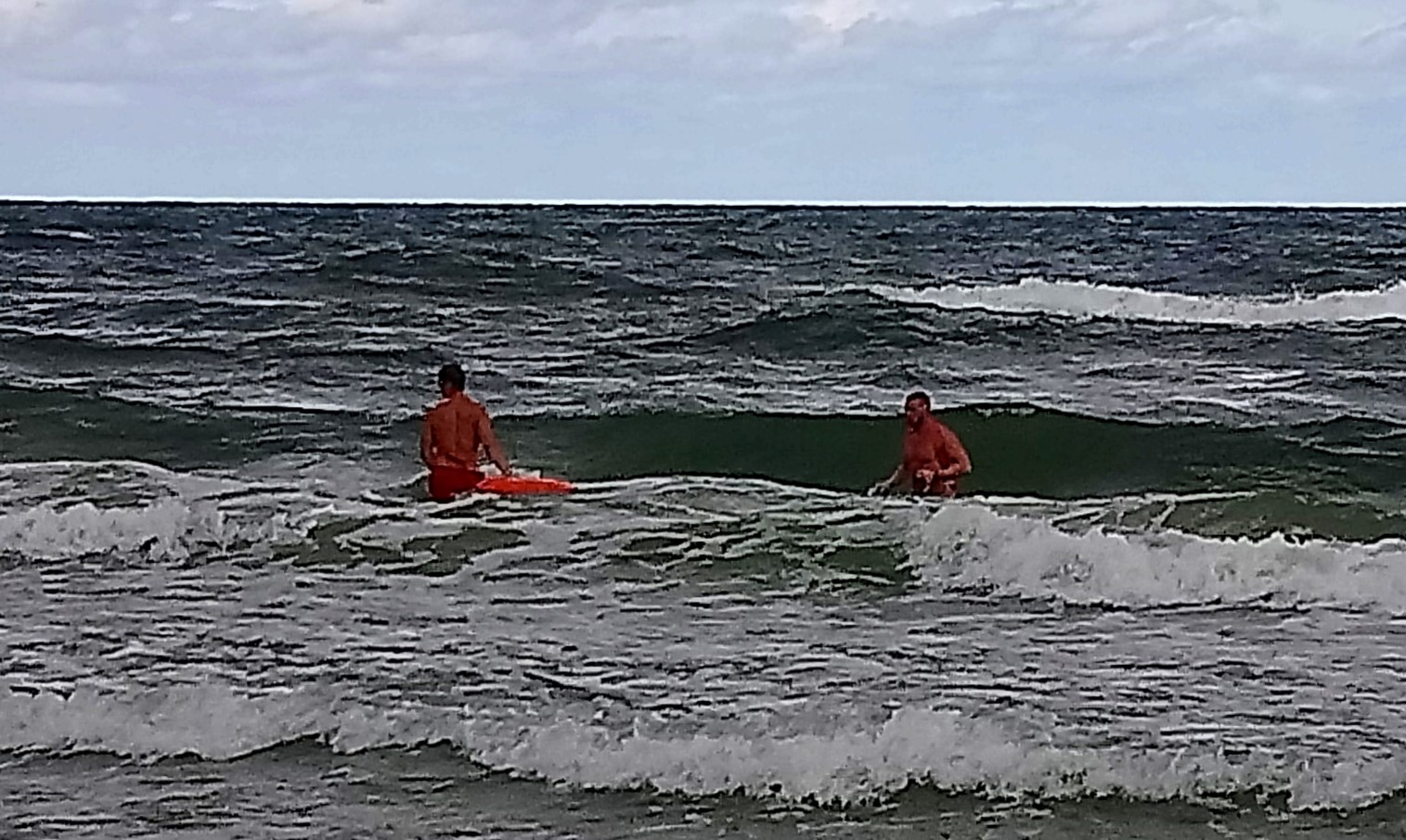 Codzienne sprawdzanie akwenu i dna przed rozpoczęciem pracy.